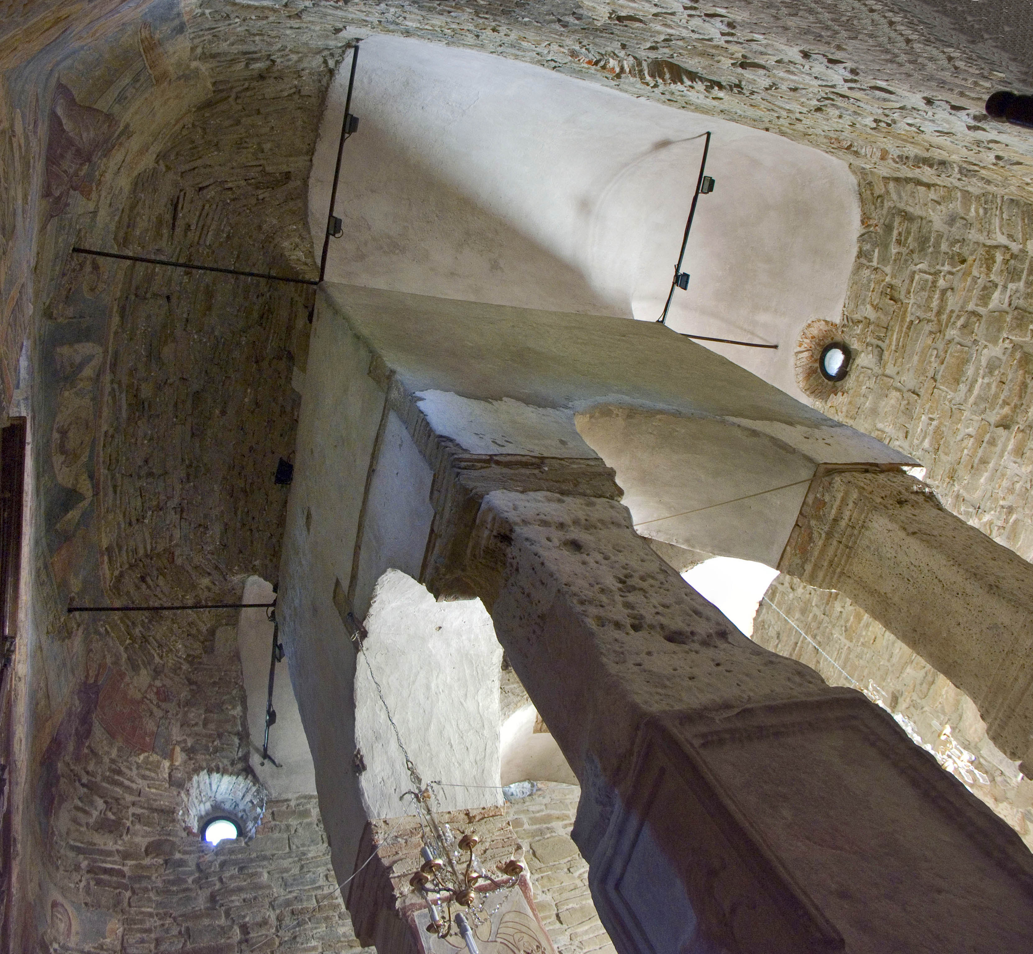 Densuş, Hunedoara: biserica de piatra medievală. Interiorul bisericii, bolta navei intersectată cu structura turnului.